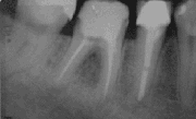 Roentgenbild Zustand 6 Monate nach ausgeheilter retrograder Wurzelspitzenresektion